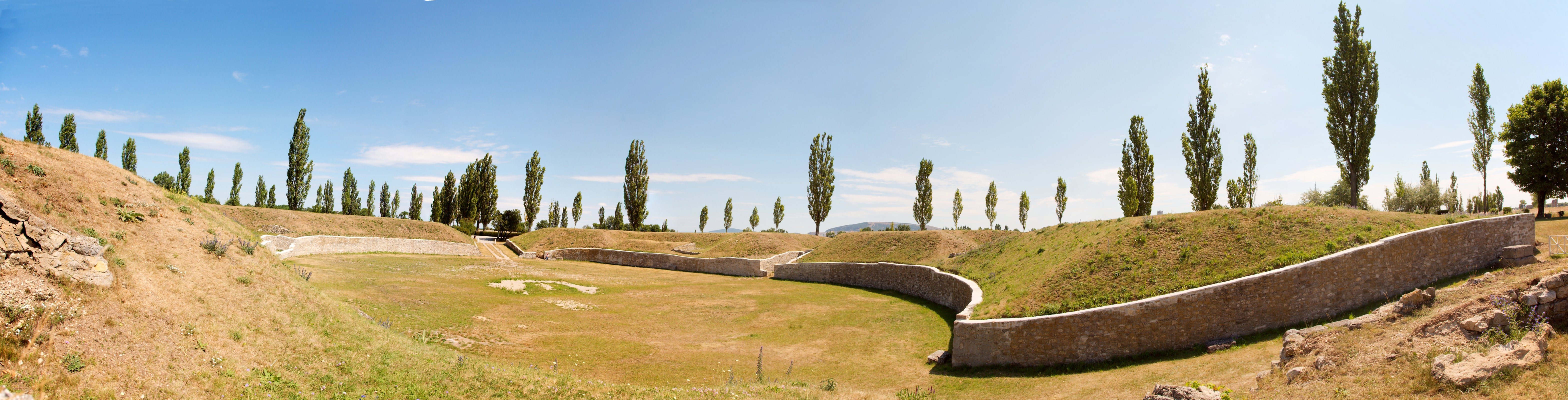 Amphitheater der Zivilstadt Carnuntum